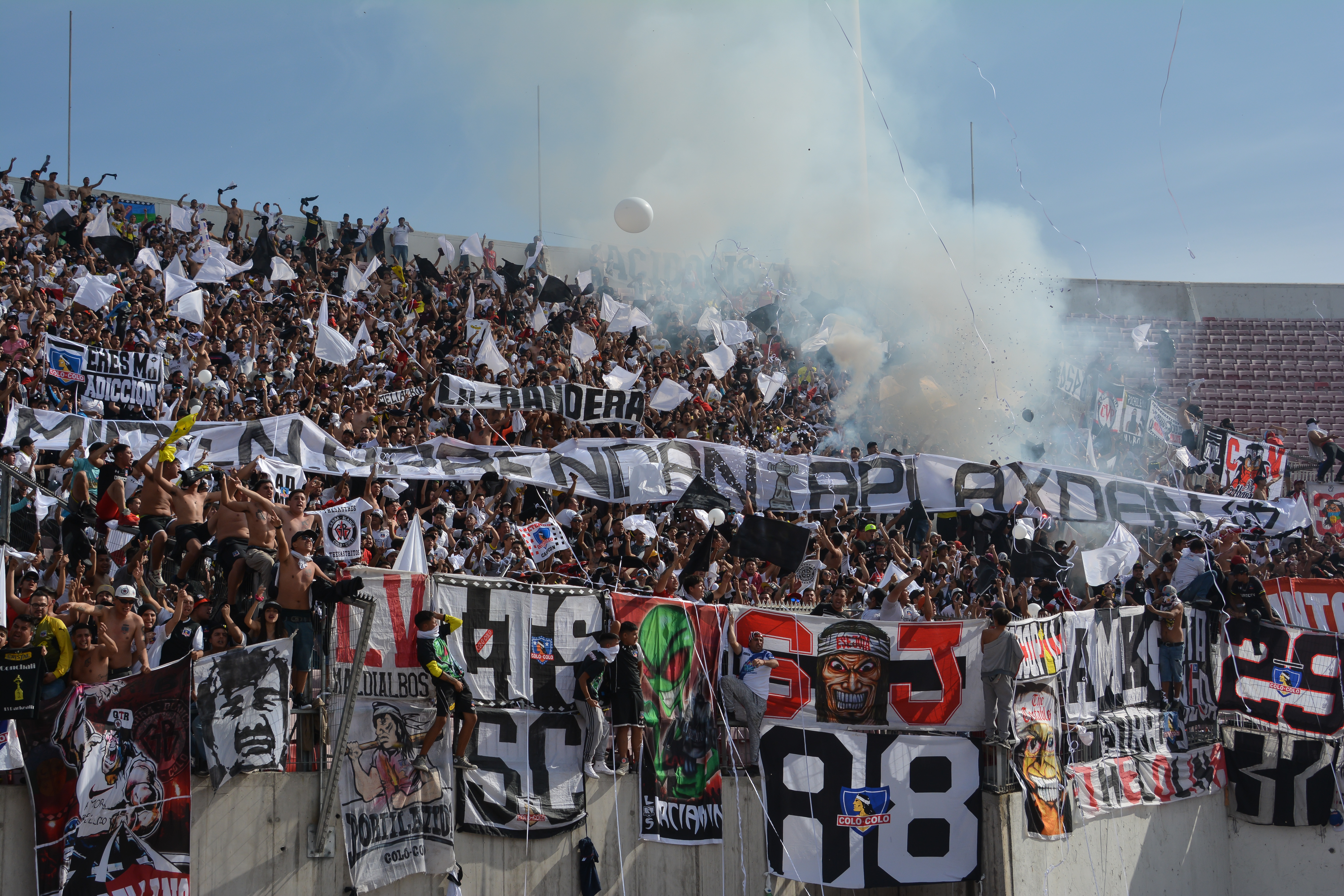 Universidad de Chile v Colo-Colo, Estadio Nacional, Santiago, Chile.